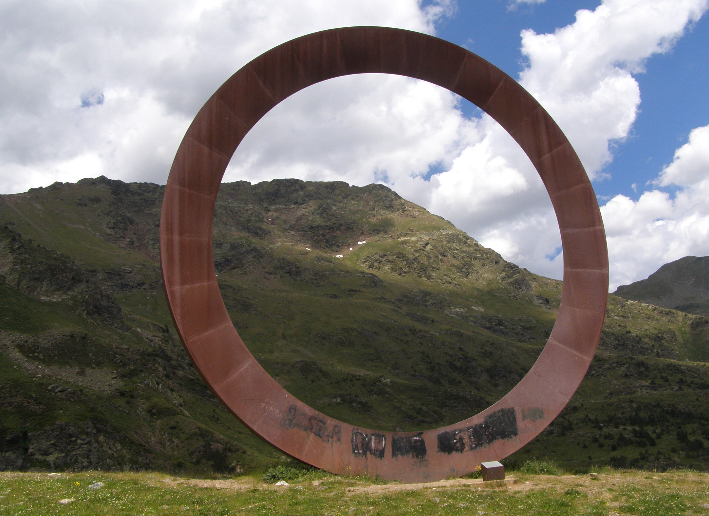 Una altra vista del cercle...els brètols arriben a tot arreu! ""L'anell" de Mauro Staccioli és una ecultura encarregada per la Caixa Andorrana de Seguretat Social per celebrar el 25è aniversari. Segons l'autor, representa l'aliança entre l'art i la vida, la raó i el paisatge; l'anell ajuda l'espectador a descobrir les imatges reals, les autèntiques perspectives, el pensament profund, la morfologia del paisatge. L'anell té també un altre efecte (sempre segons l'autor): mica en mica, a mesura que t'hi vas acostant, dóna la sensació de que, com una roda enorme, l'anell ve rodolant cap a tu. Per Mauro Staccioli el seu treball no té una finalitat estètica sinó que té la funció de qüestionar les coses."